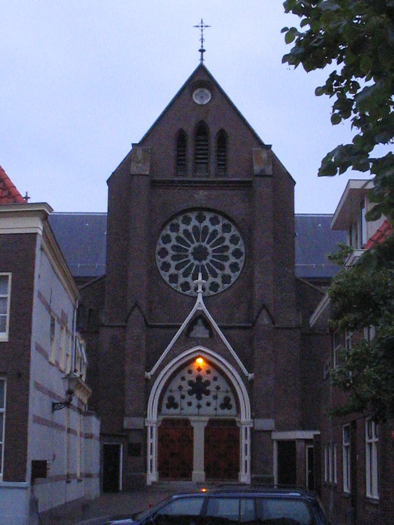 St. Laurentiuskerk, church, Alkmaar. July 2005